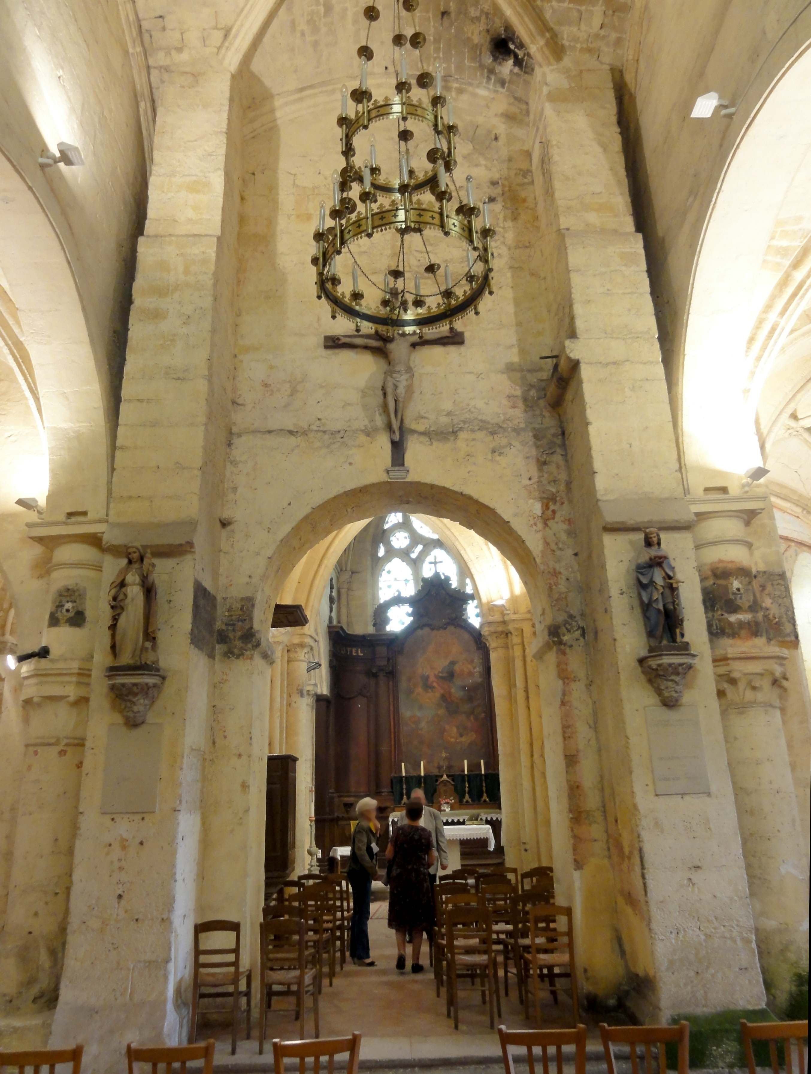 Intérieur de l'église (voir titre).